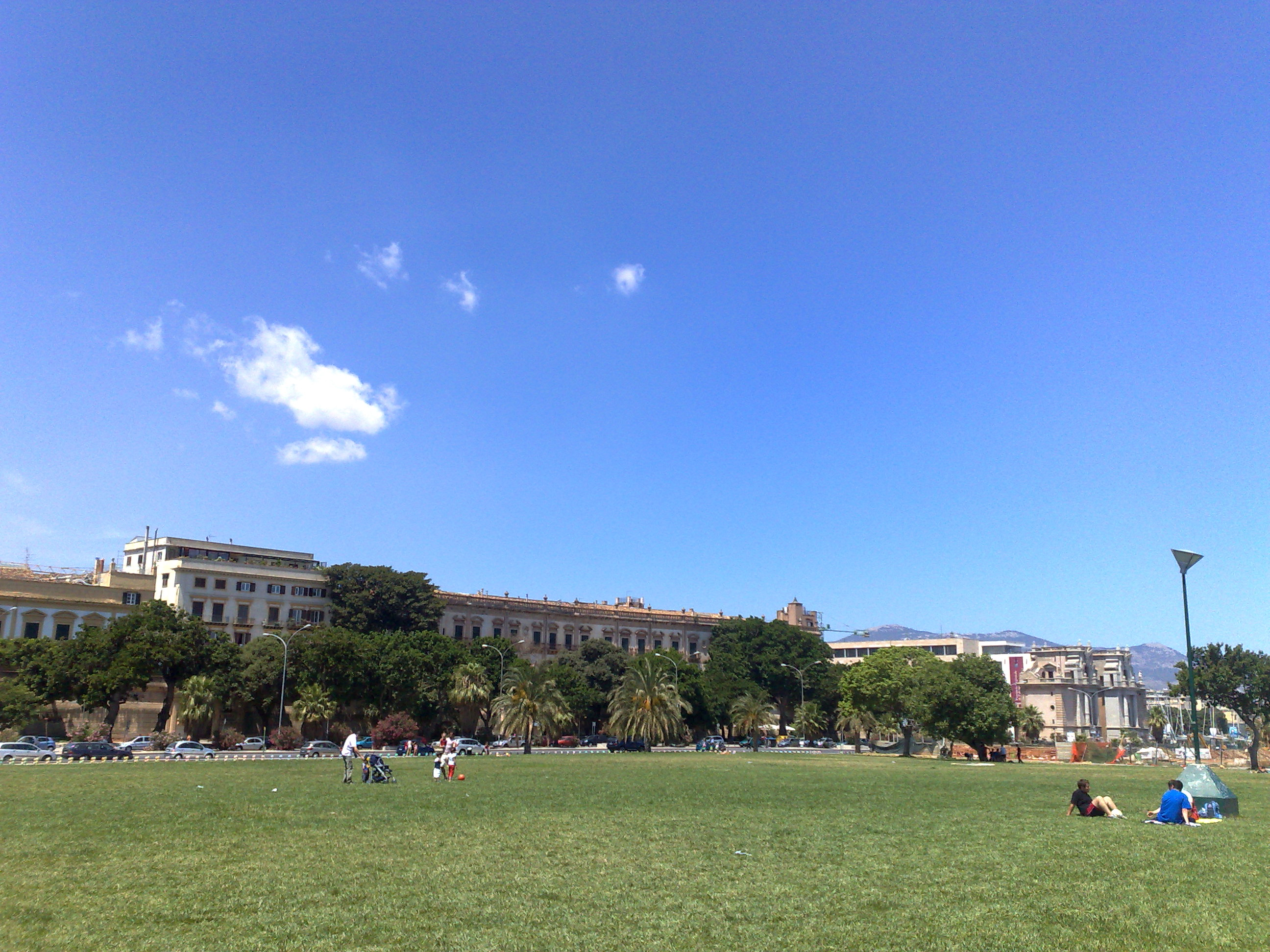 Palermo, il centro storico visto dal Foro Italico (nell'ordine, da sinistra: Palazzo Lampedusa, ex Albergo Trinacria, palazzo Butera, Porta Felice)